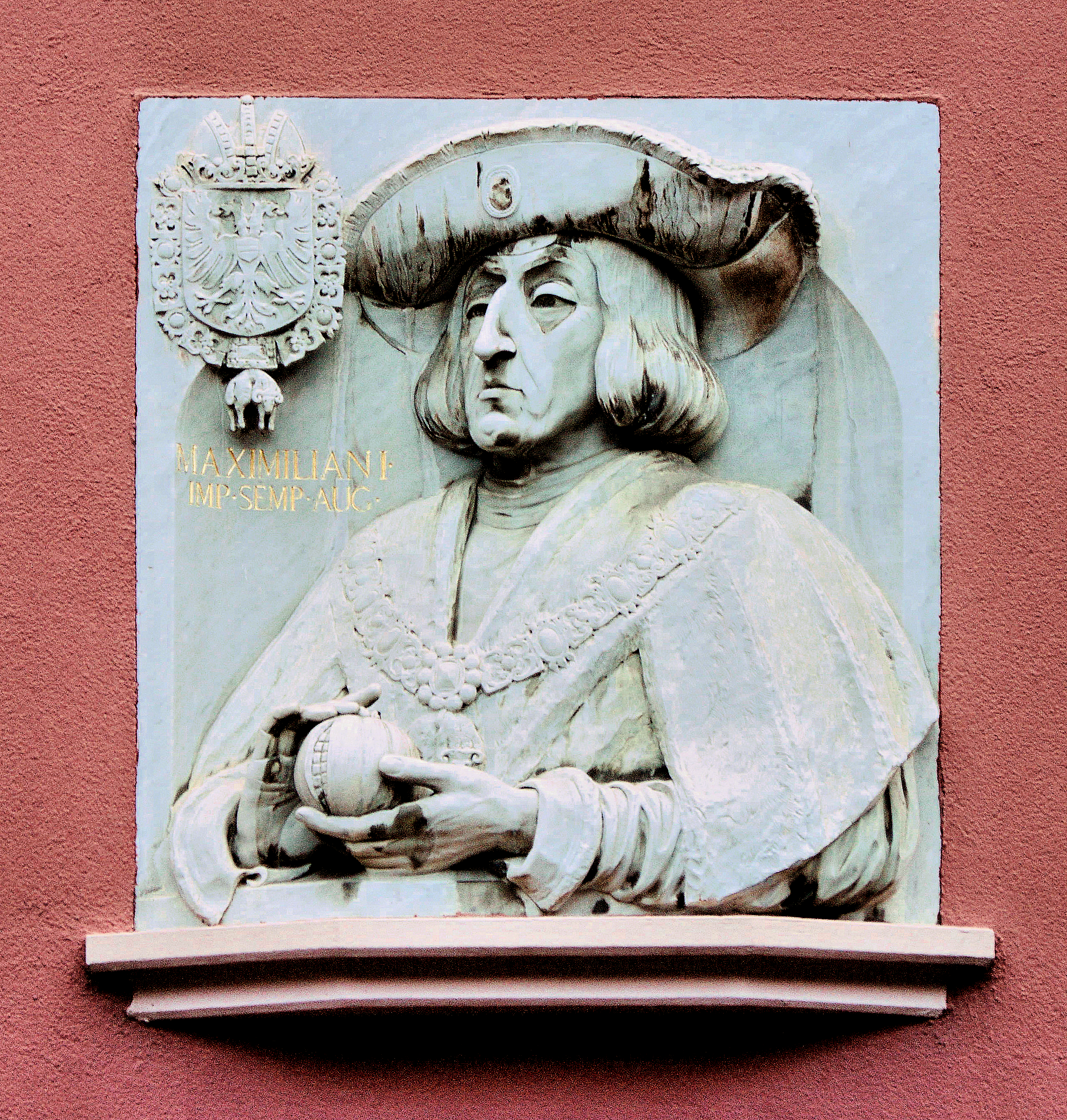 Historische Häuser in Freiburg: Haus zum Walfisch, Marmor Portrait Maximilian I. Der Ursprung ist ein Holzschnitt Dürers